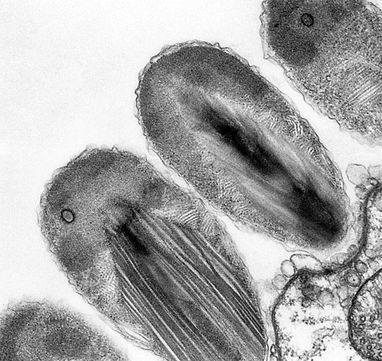 Epixenosomi in sezione longitudinale al TEM. Notare la struttura complessa inusuale nei procarioti.